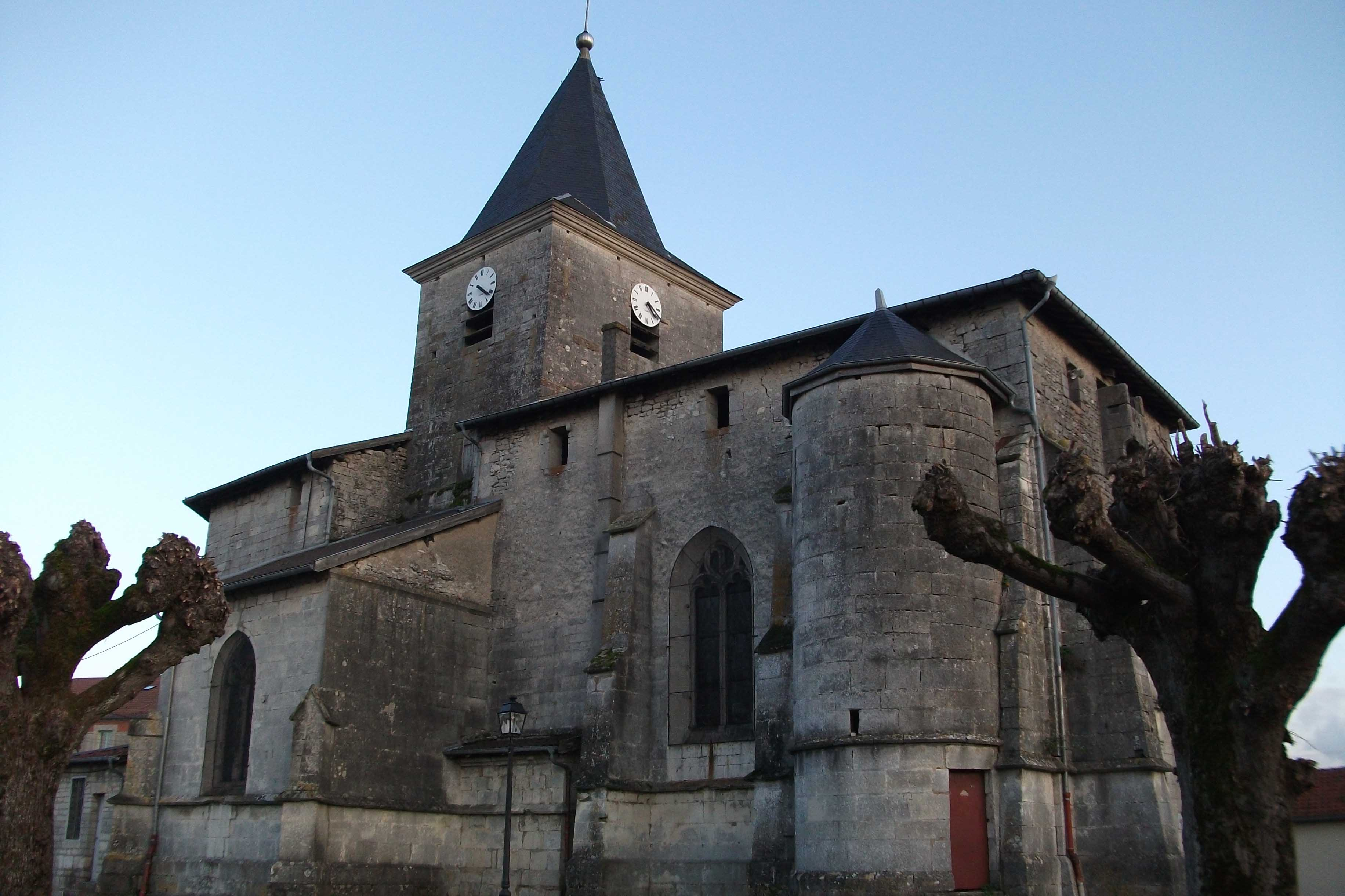 vue latérale de l'église de Tronville-en-Barrois.